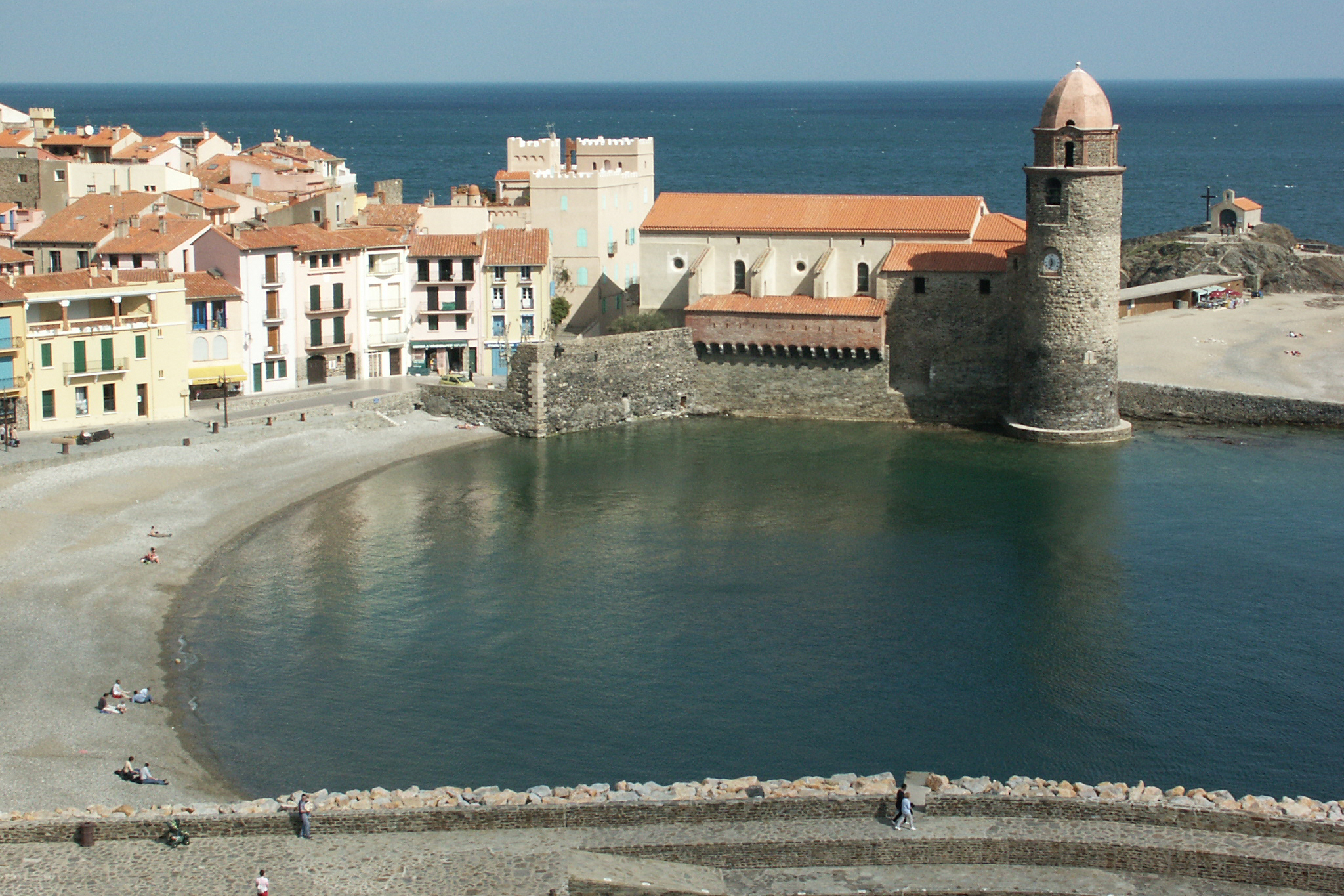 Blick auf einen Teil von Collioure (Frankreich) mit Wehrkirche